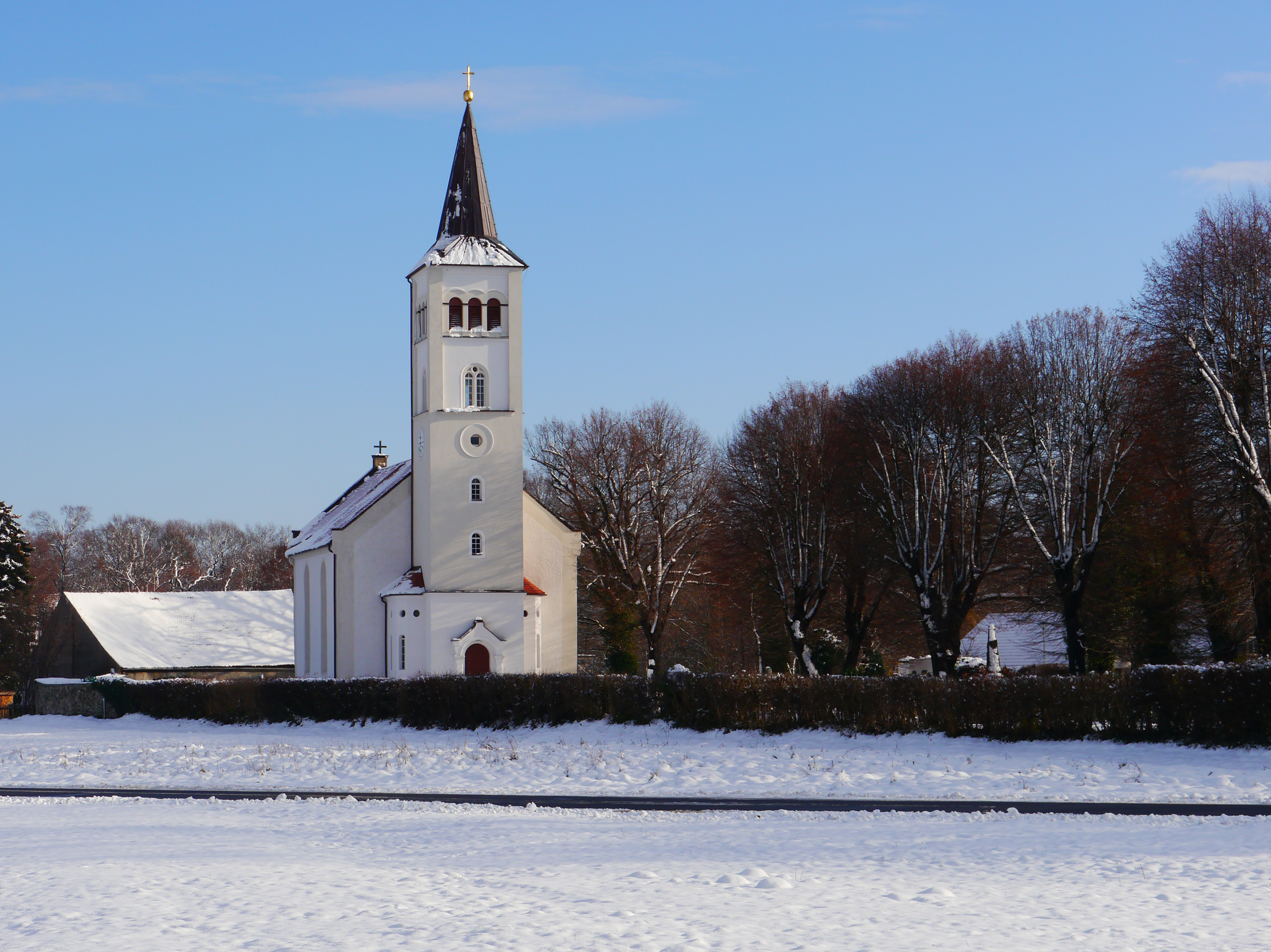 Kirche der "Evangelischen Trinitatisgemeinde am See" in der Ortschaft See, die zu Niesky gehört.